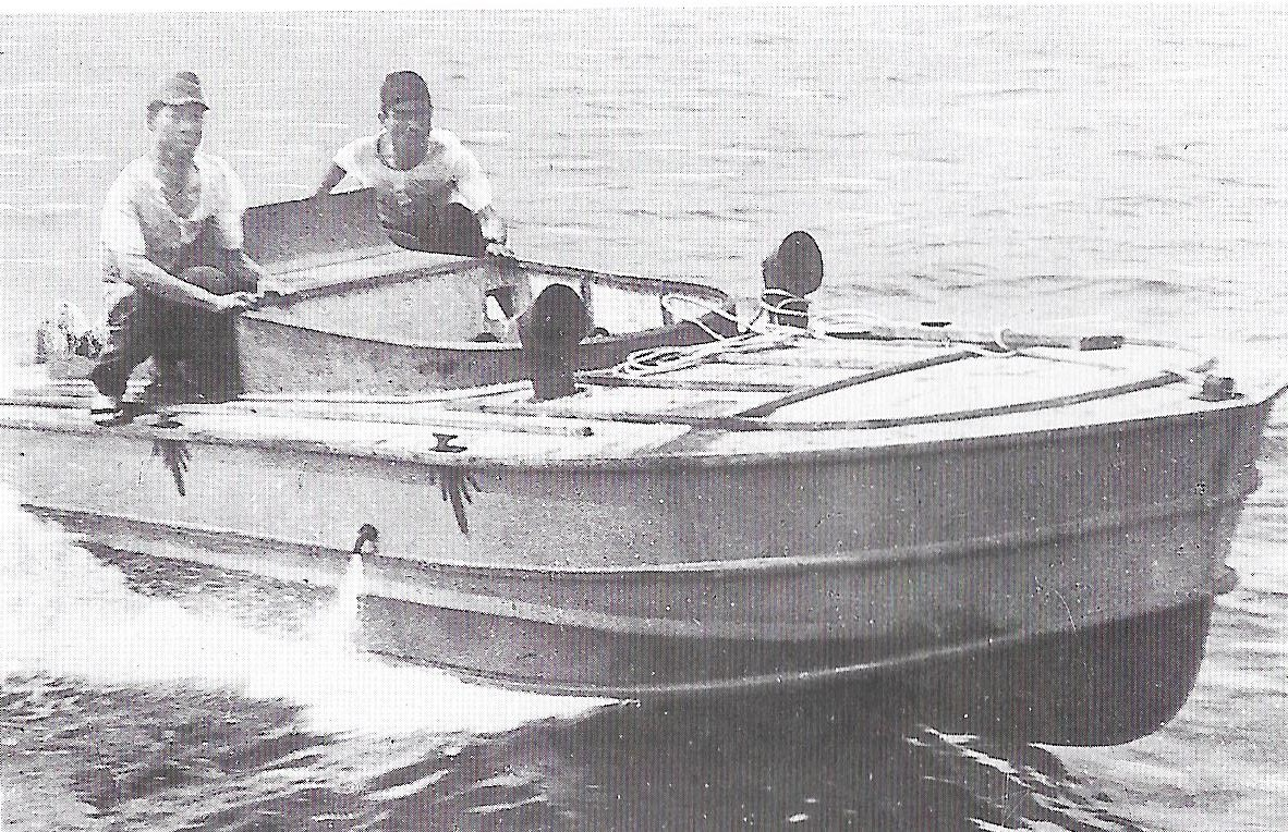 סירת נפץ יפנית שהופעלה במלחמת העולם השניה